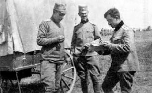 Ambulanta 3. jugoslovanskega prostovoljskega polka v Dobrudži. Od leve na desno:Radola Gajda, dr. Josip Hebein in dr. Milko Gnezda.